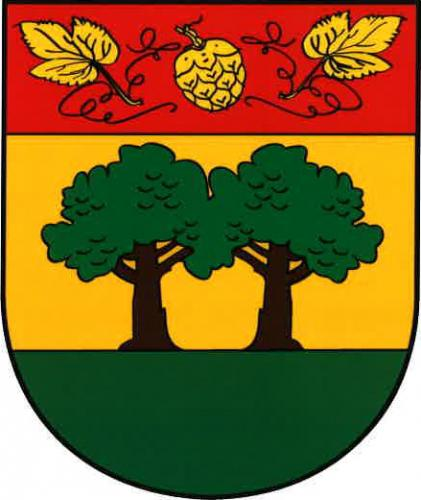 znak, Domoušice, okres Louny